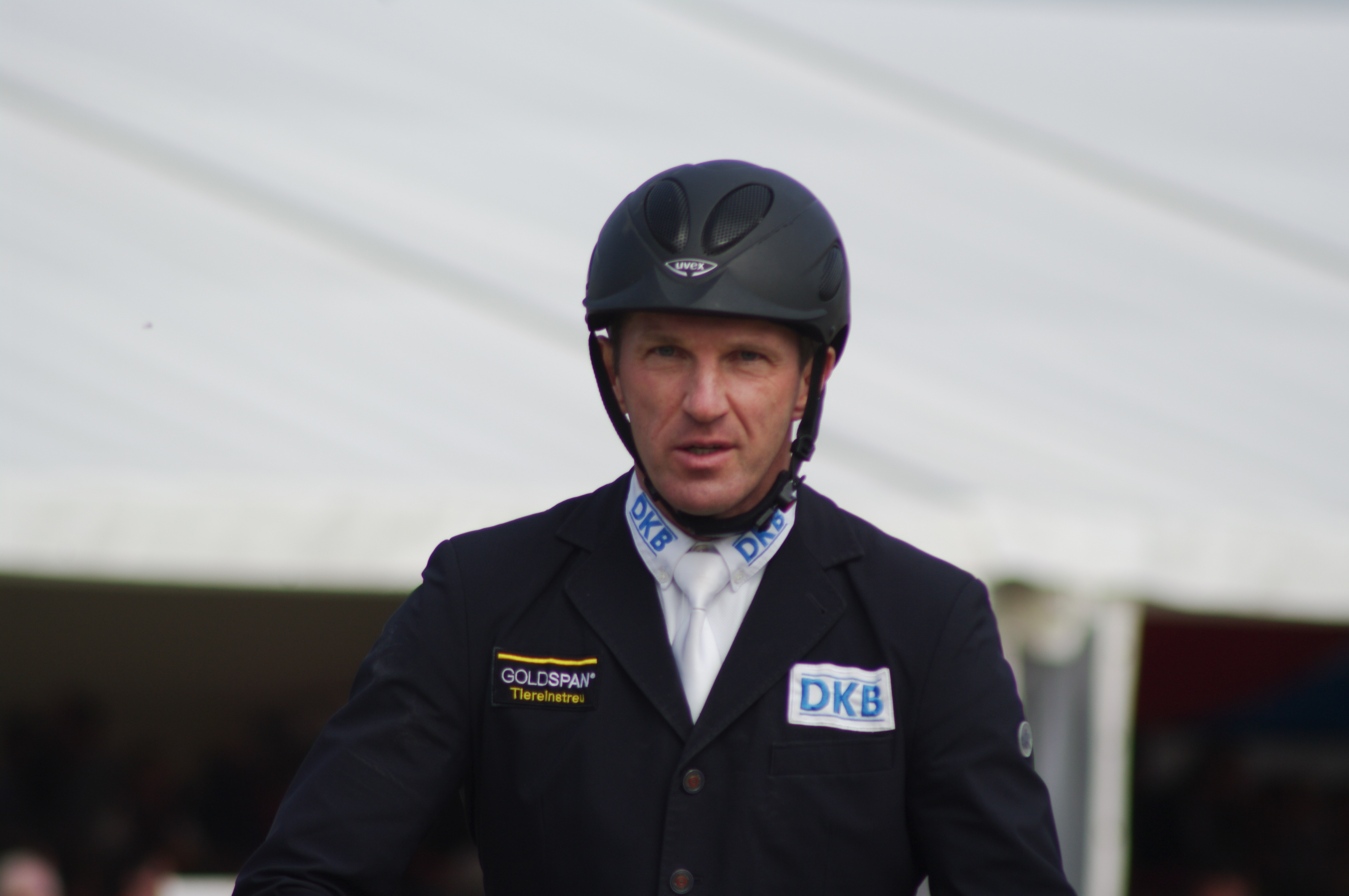 Horses & Dreams 2013: Holger Wulschner mit Cavity G